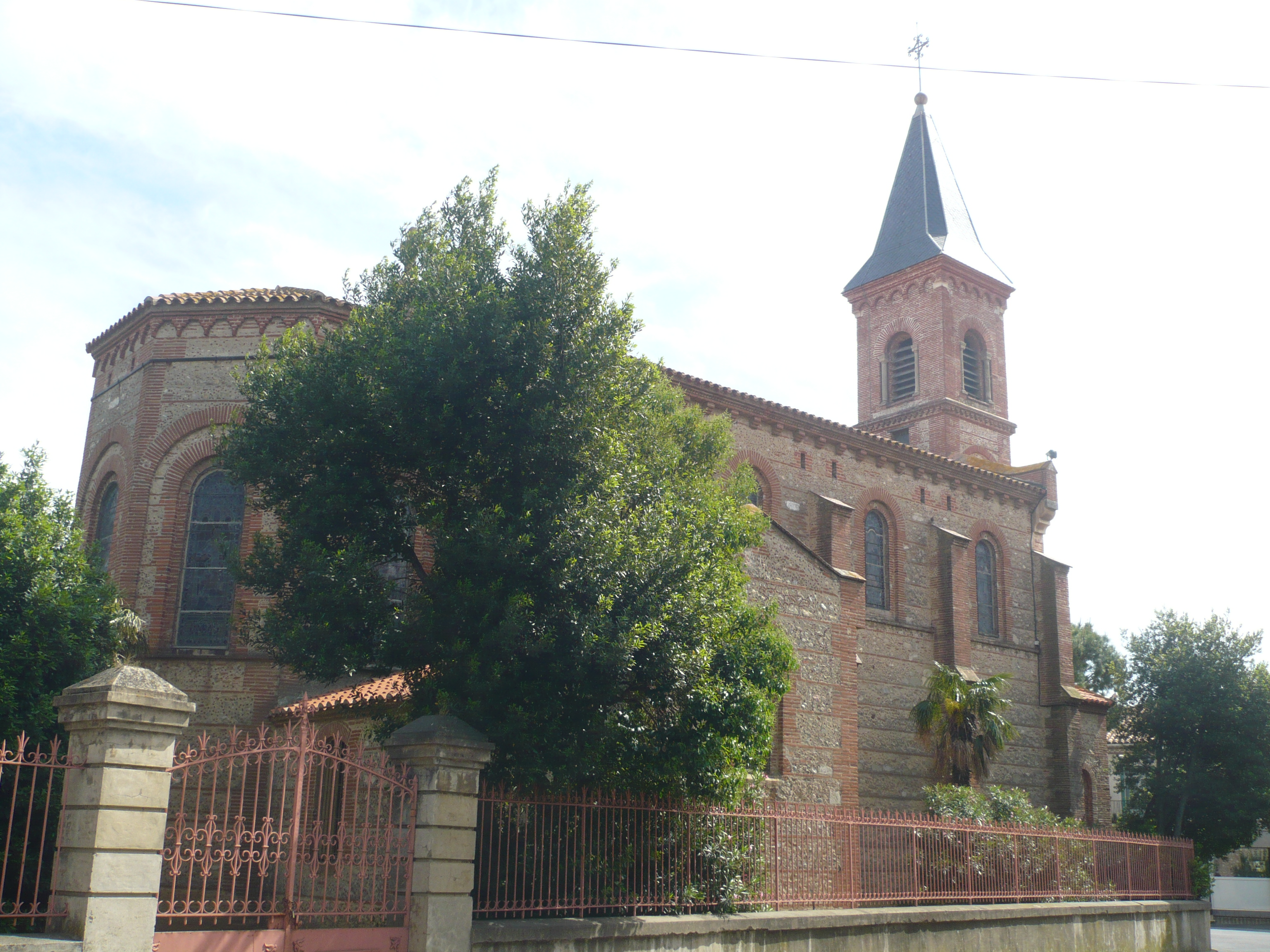 Vue d'ensemble de l'église Saint-Christophe à Corneilla-del-Vercol